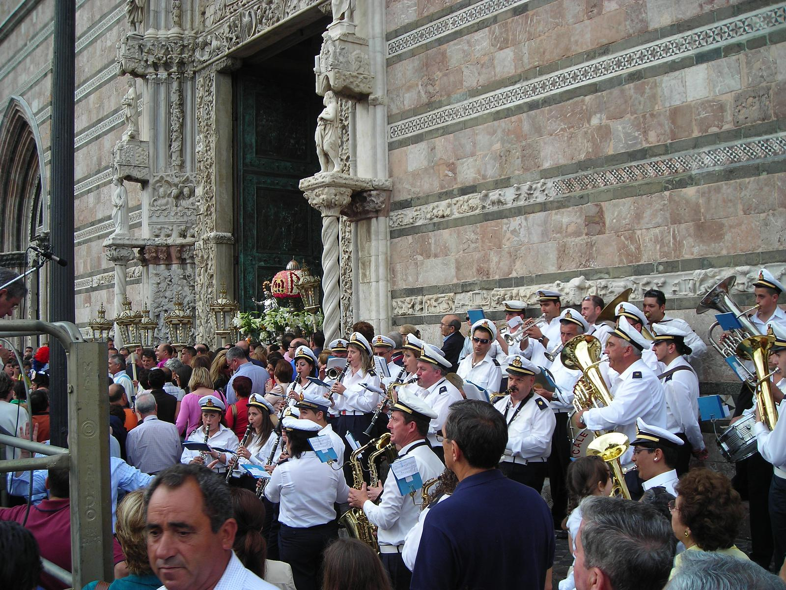 Festeggiamenti della santissima patrona di Messina